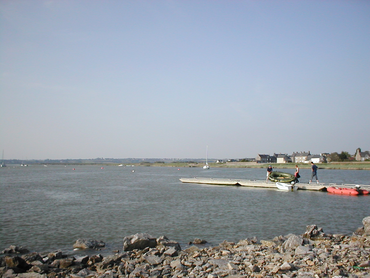 port de regneville